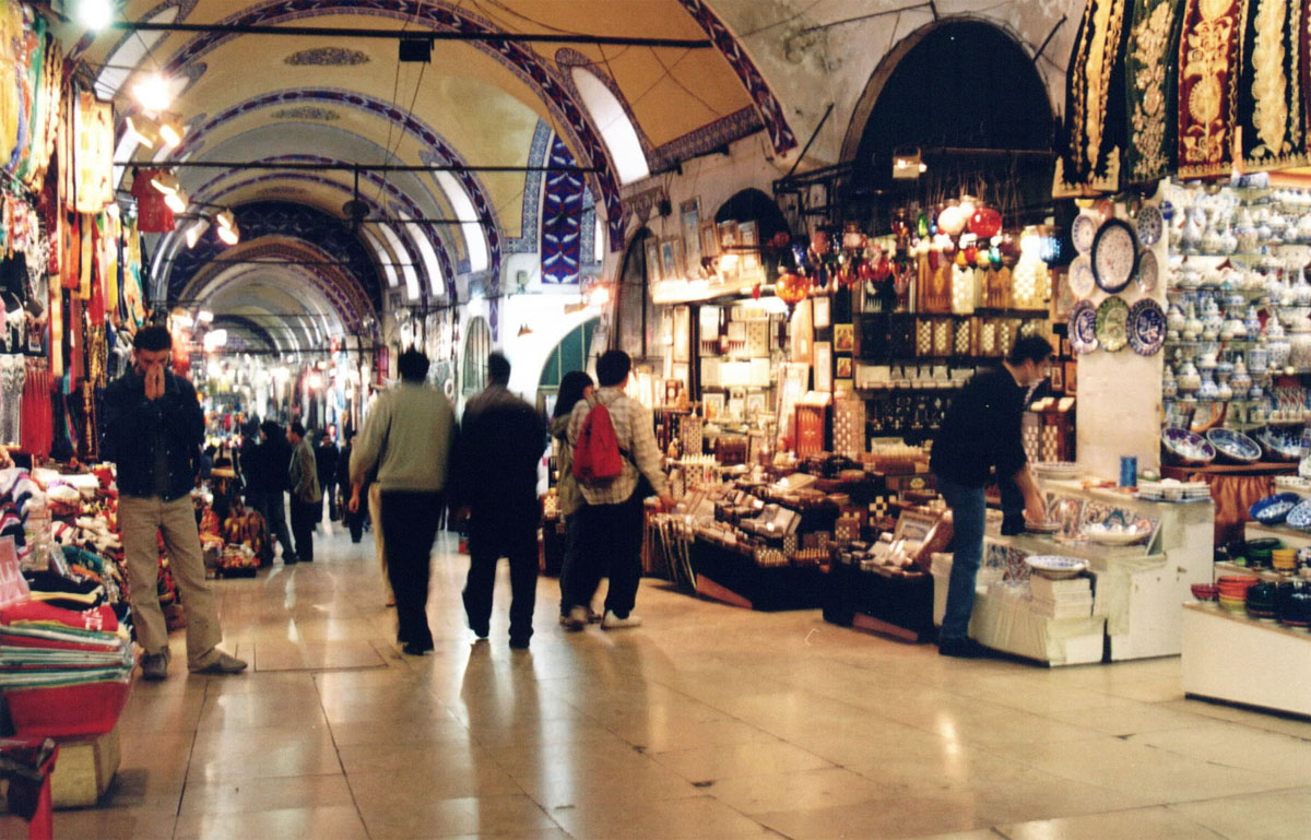 Grand Bazaar in Istanbul, Turkey